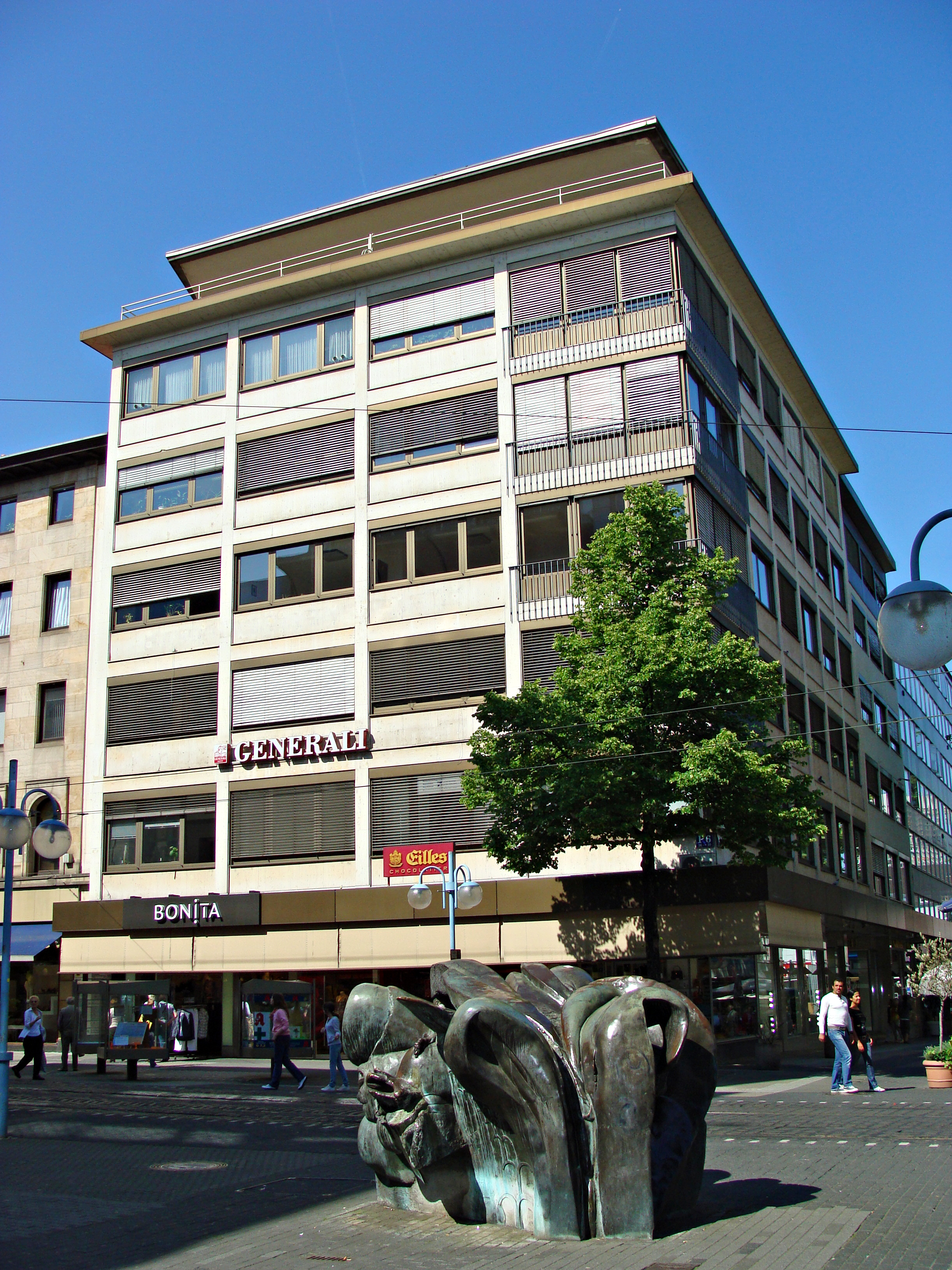 Deutschland: Sozialgericht Mannheim in P 6